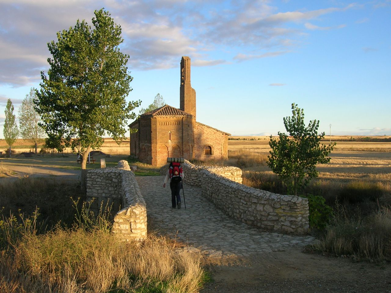 Al cruzar este puente medieval, nos encontramos con la ermita de la Virgen del Puente. En el recinto que se encuentra al lado de esta antigua hospedería, se celebra cada 25 de abril una romería donde los asistentes reciben pan y queso.